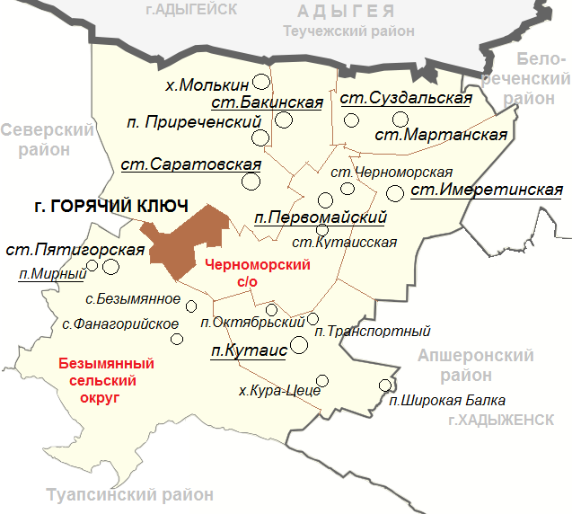 Сельские округа, подчинённые администрации города краевого подчинения Горячий Ключ в Краснодарском крае России